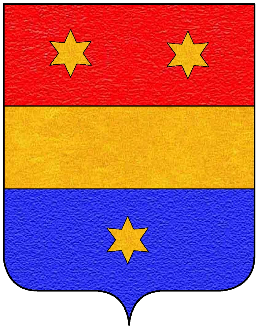 Stemma della famiglia Albani